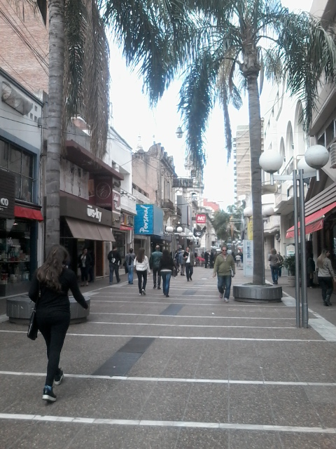 Parte de la peatonal San Martín en Santa Fe